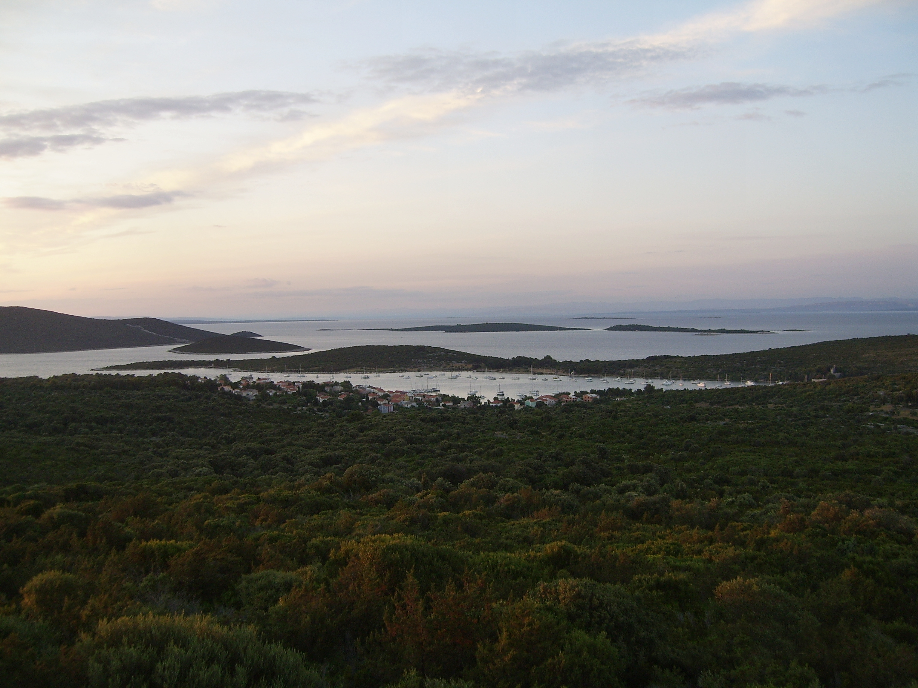 Ilovik, slikano s najvišeg vrha na otoku Did. Vide se: mjesto Ilovik, kanal i otočić Sv. Petar u središnjem dijelu slike, malo lijevo je otočić Kozjak, skroz lijevo je Lošinj, u gornjem dijelu su Vele Orjule (lijevo) i Male Orjule (desno), a u njihovoj pozadini je otočić Oruda